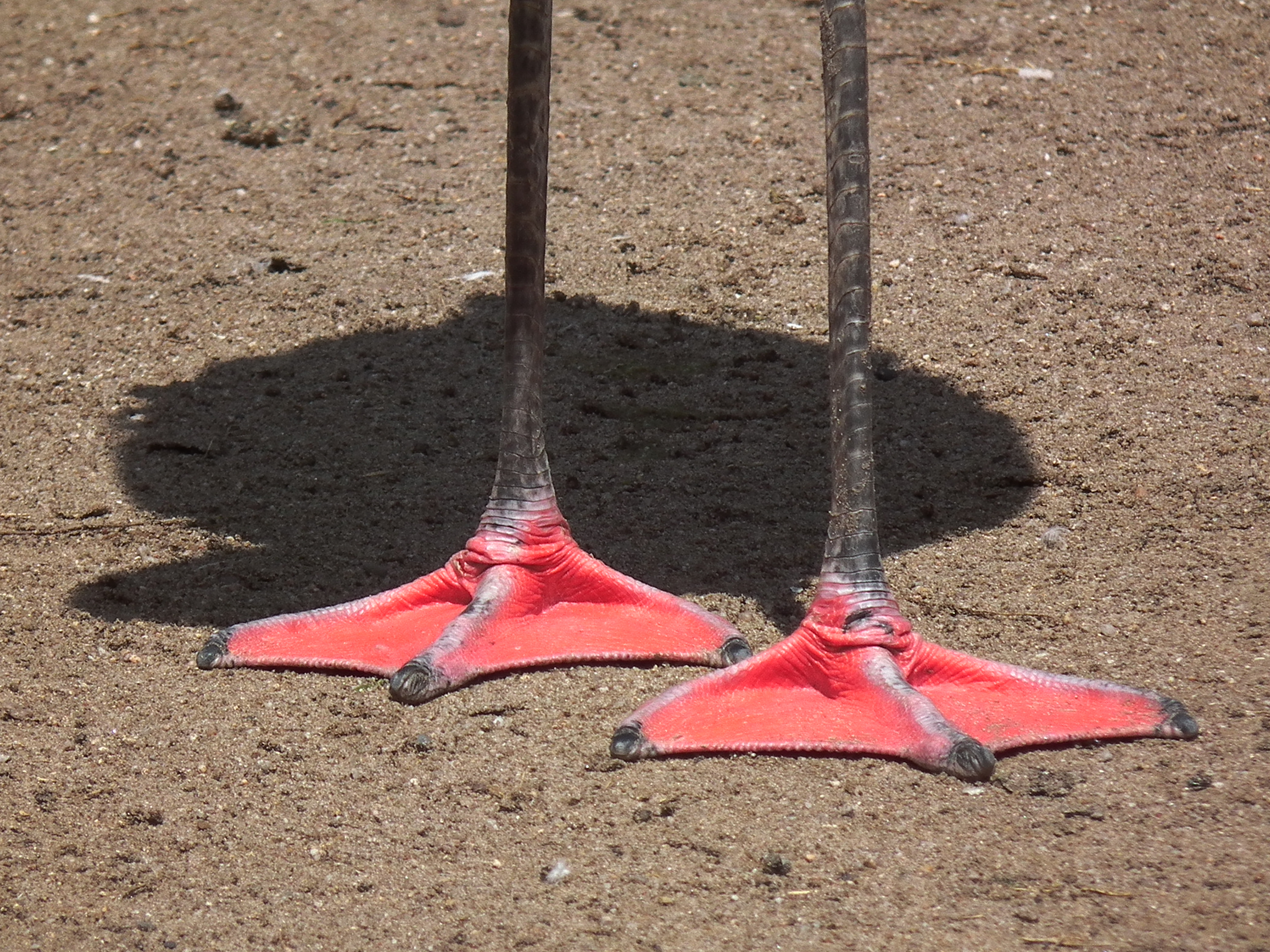 Chile-Flamingo (Phoenicopterus chilensis) im Zoo Landau (Rheinland-Pfalz, Deutschland)